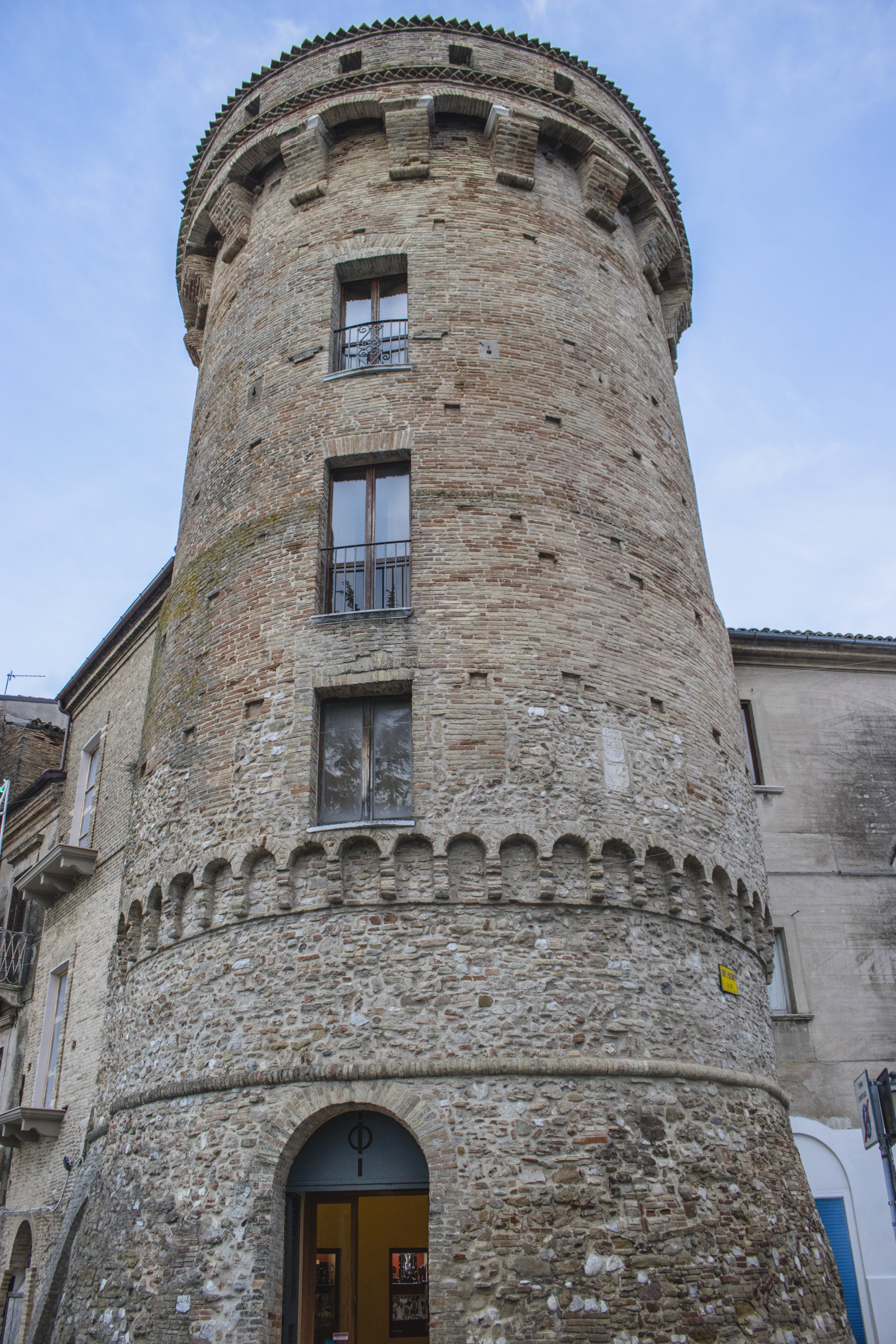 La Torre Bassano in Piazza Rossetti a Vasto, vista dal basso. This is a photo of a monument which is part of cultural heritage of Italy.